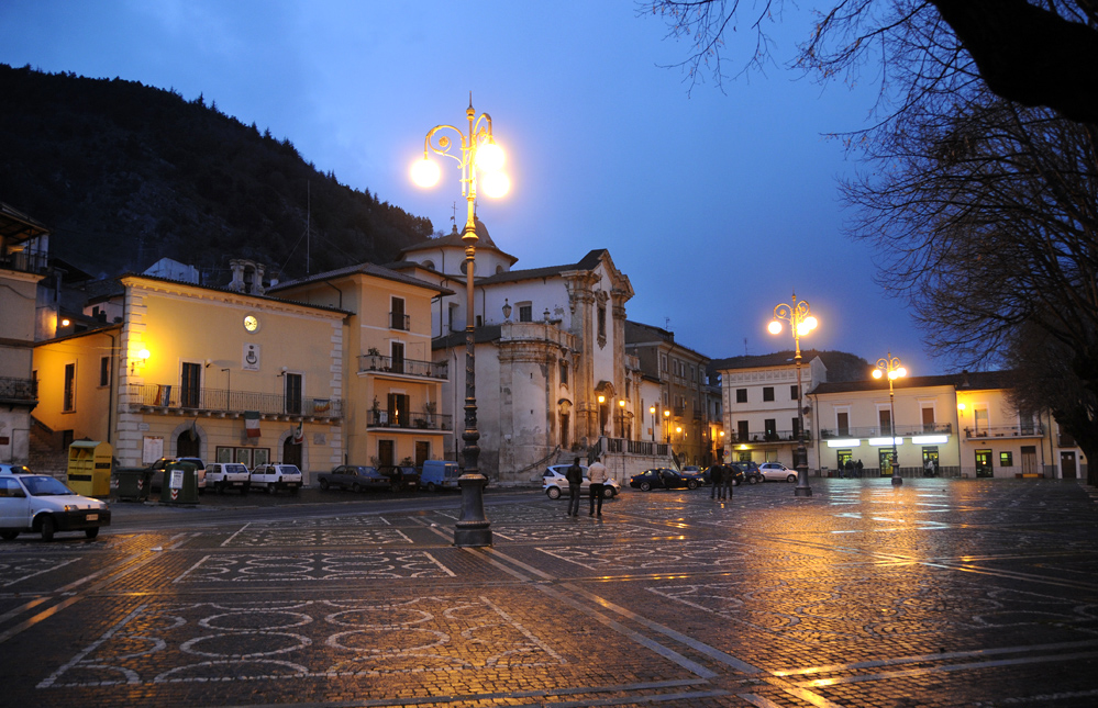 Piazza Umberto Primo